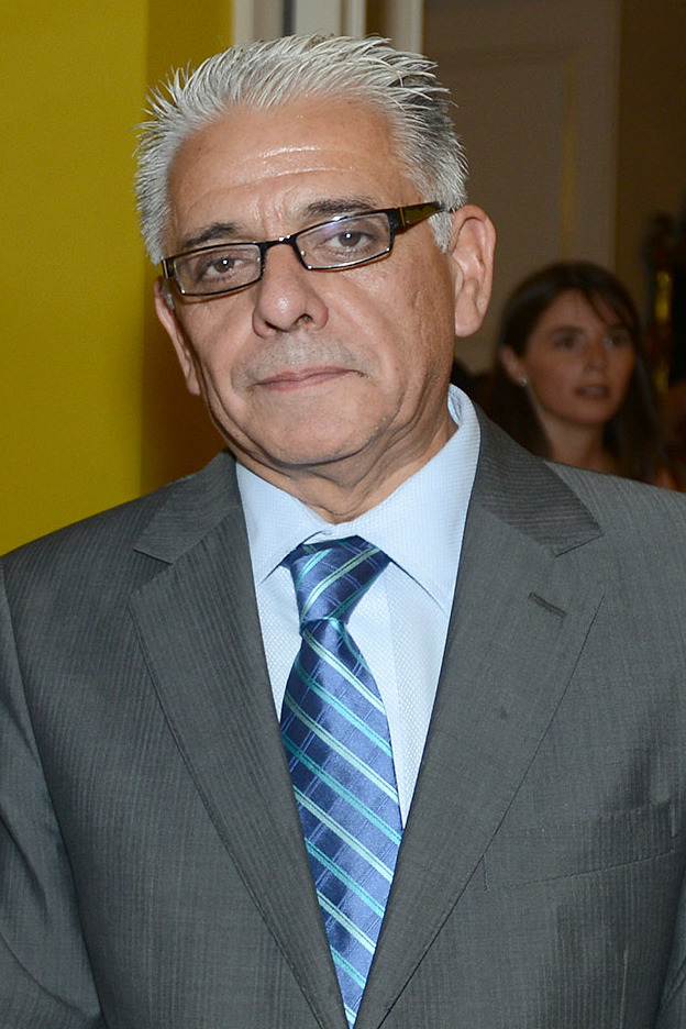 Cena de la Prensa en el Palacio de La Moneda en 2014.